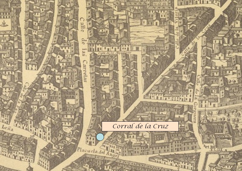 Localización aproximada del antiguo corral de comedias de la Cruz en Madrid, en el plano de Pedro Teixeira, hacia 1656.